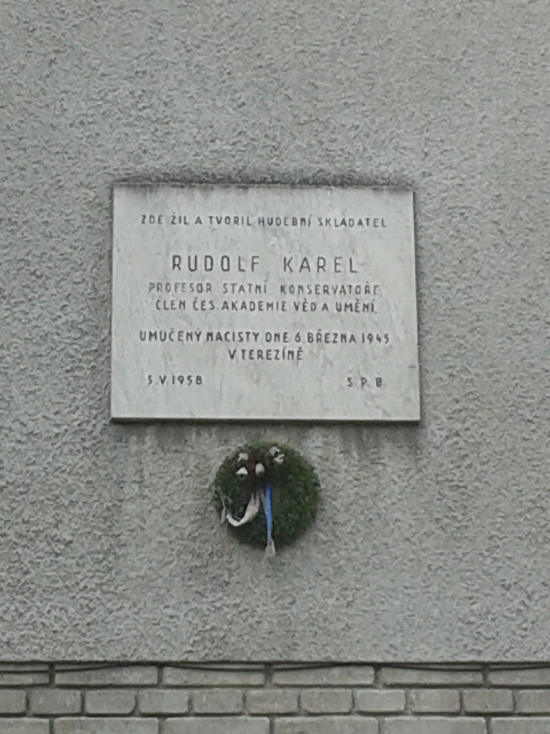 Rudolf Karel (1880 - 1945), český hudební skladatel a dirigent. Na domě čp. 515 V Cibulkách 47 Praha 5 Košíře je pamětní deska s textem: „Zde žil a tvořil hudební skladatel // Rudolf Karel / profesor státní konservatoře, / člen Čes. akademie věd a umění, / umučený nacisty dne 6. března 1945 / v Terezíně. // 5.V.1958. SPB“.